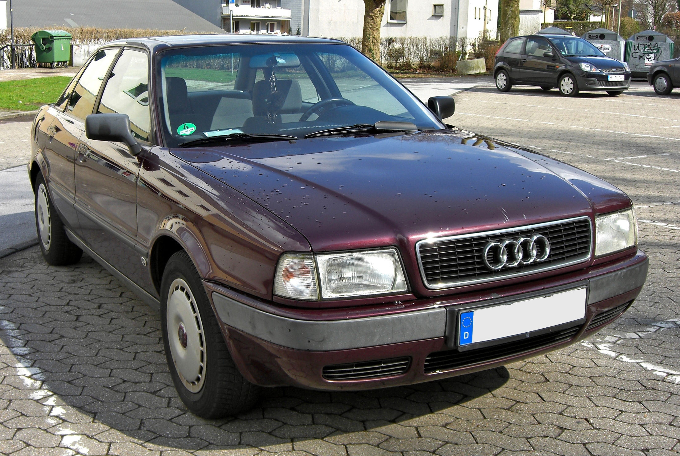 Audi 80 B4